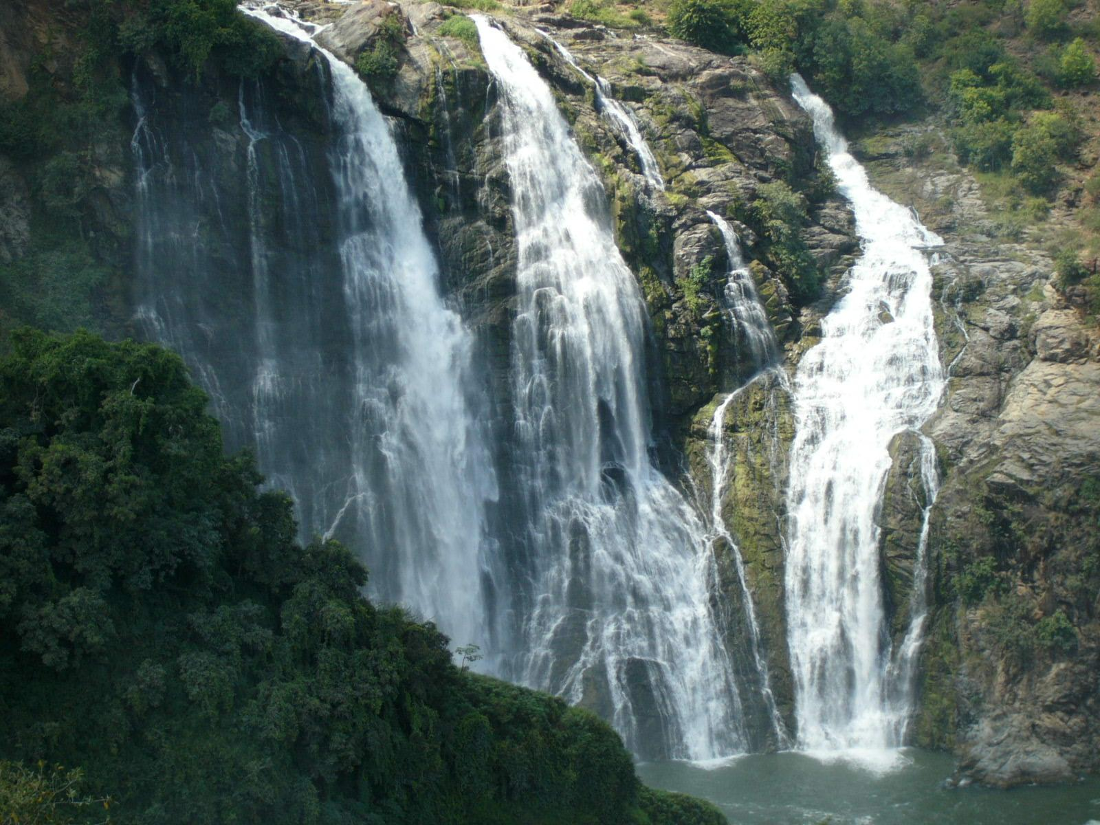 Shivanasamudram Water Falls, india. nearest City Bangalore karnataka